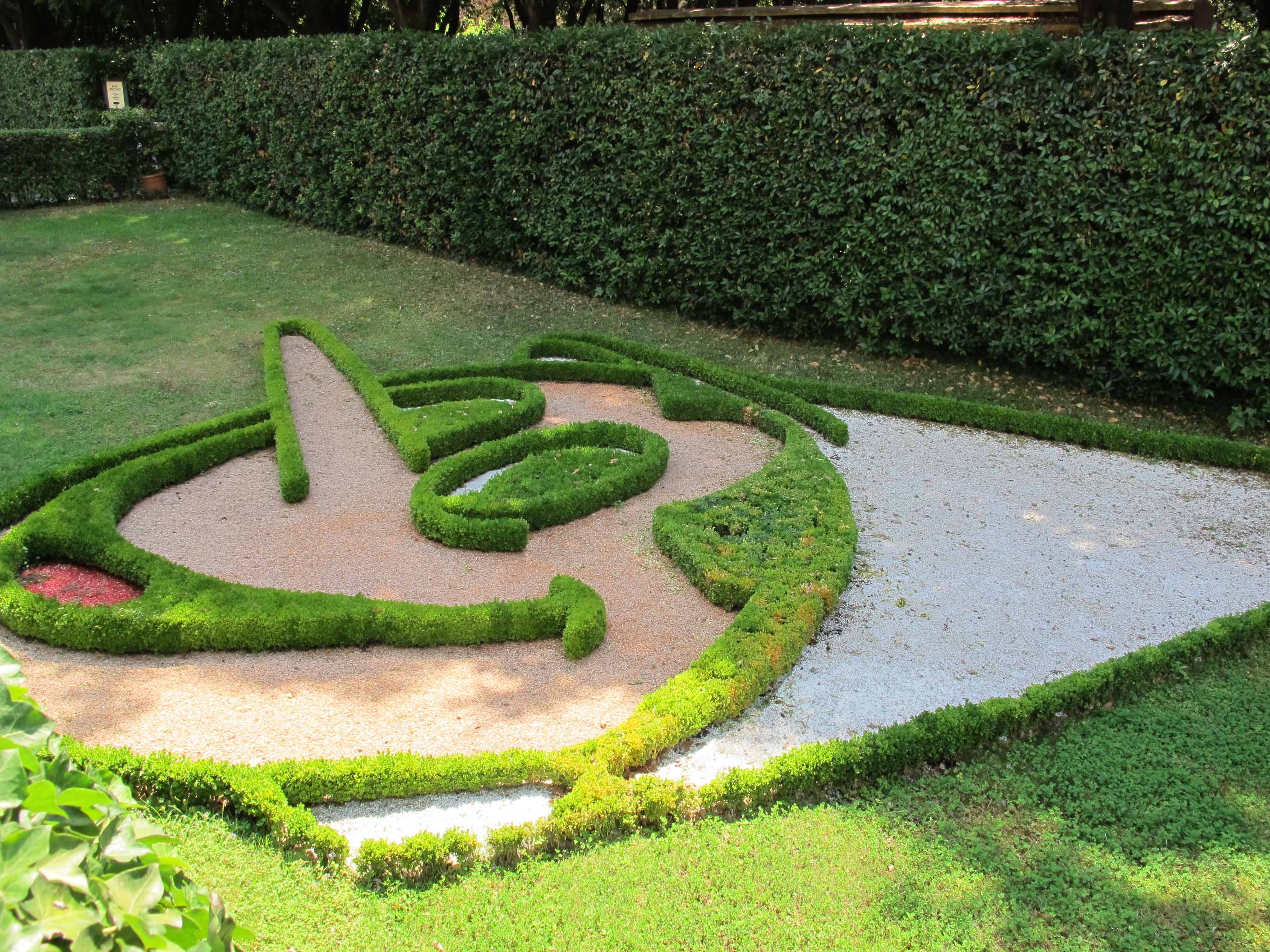 Parco di pinocchio